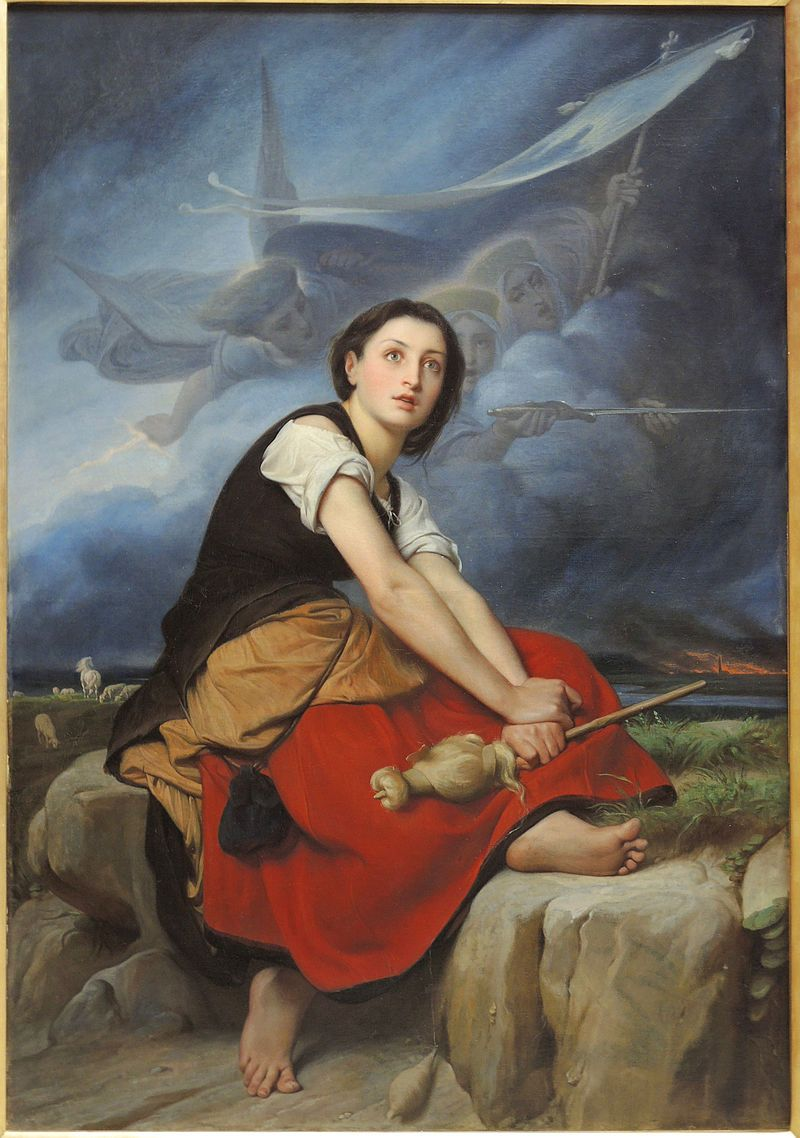 Tableau de Léon François Bénouville au musée de Rouen